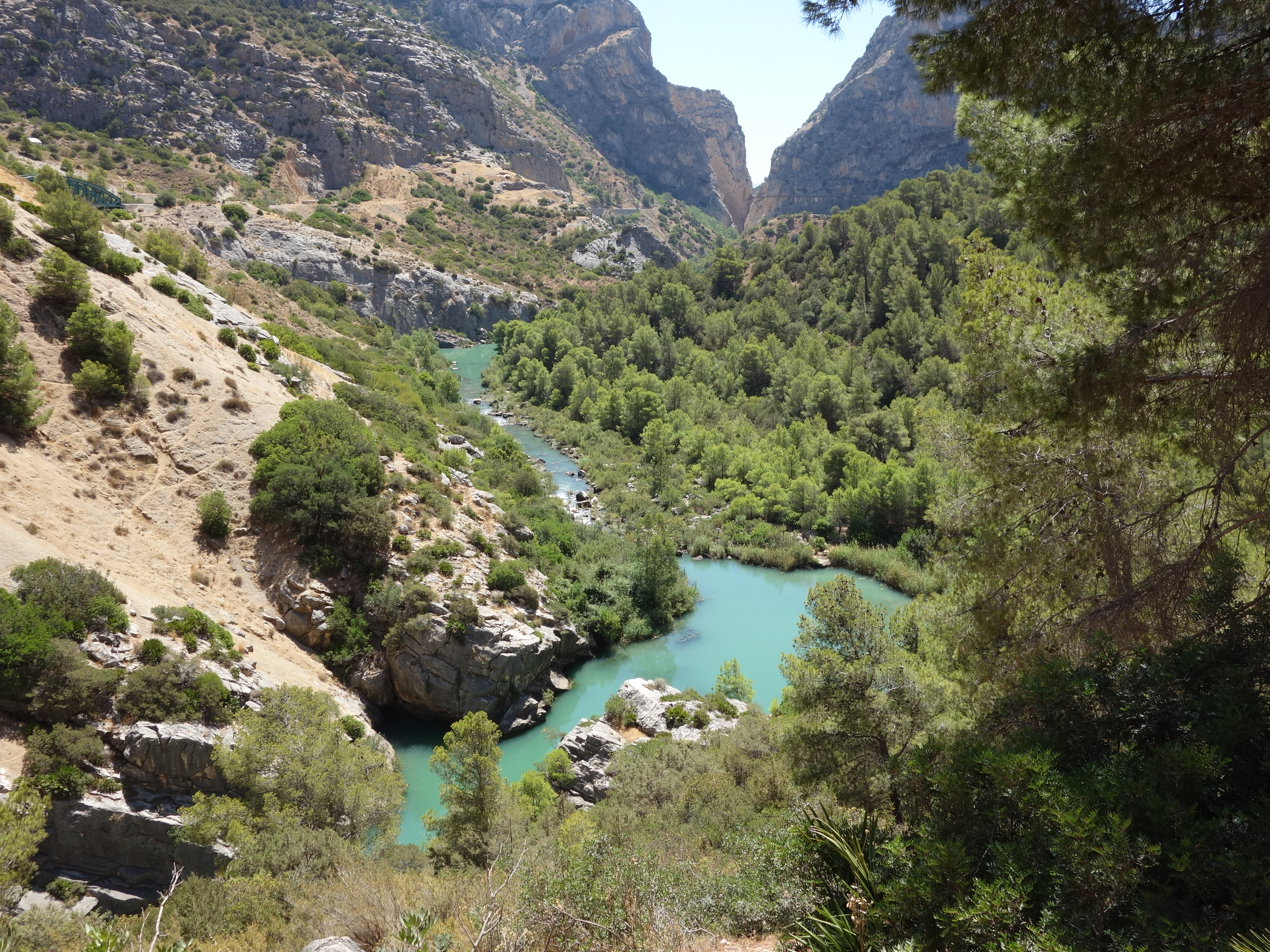 Desfiladero de los Gaitanes This is a photography of a Site of Community Importance in Spain with the ID: ES6170003. Natura2000 entry, EEA entry